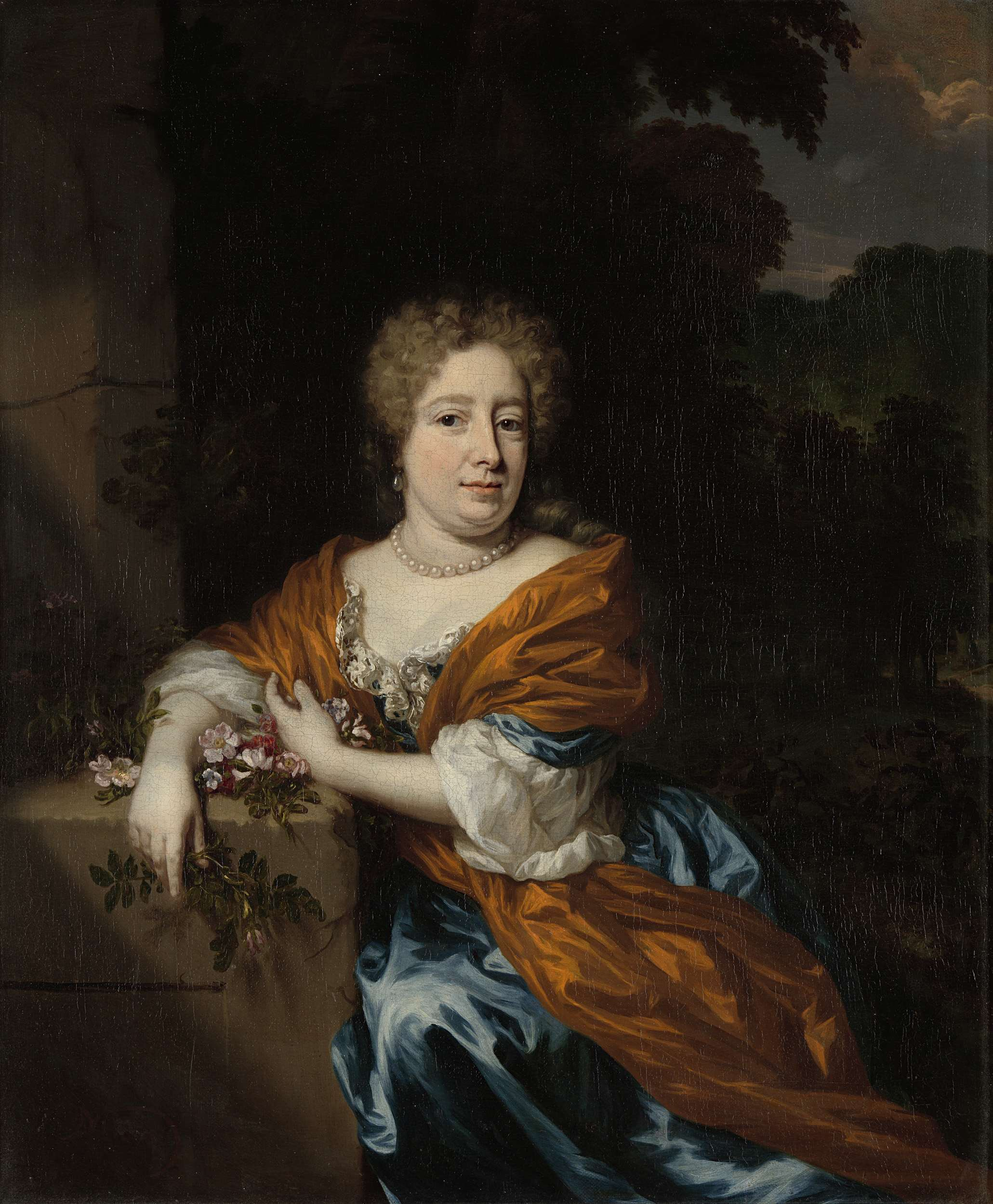 Portret van Petronella Dunois door Nicolaes Maes (1634 - 1693) Olieverf op doek, h 69,2cm × b 57,8cm. Objectnummer SK-A-4889